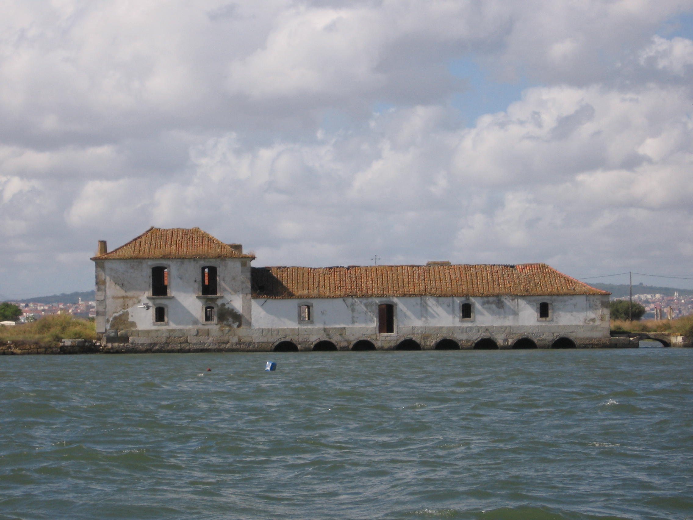 Moinho da Passagem, moinho de maré, Sapal de Corroios, Amora, Seixal, Portugal